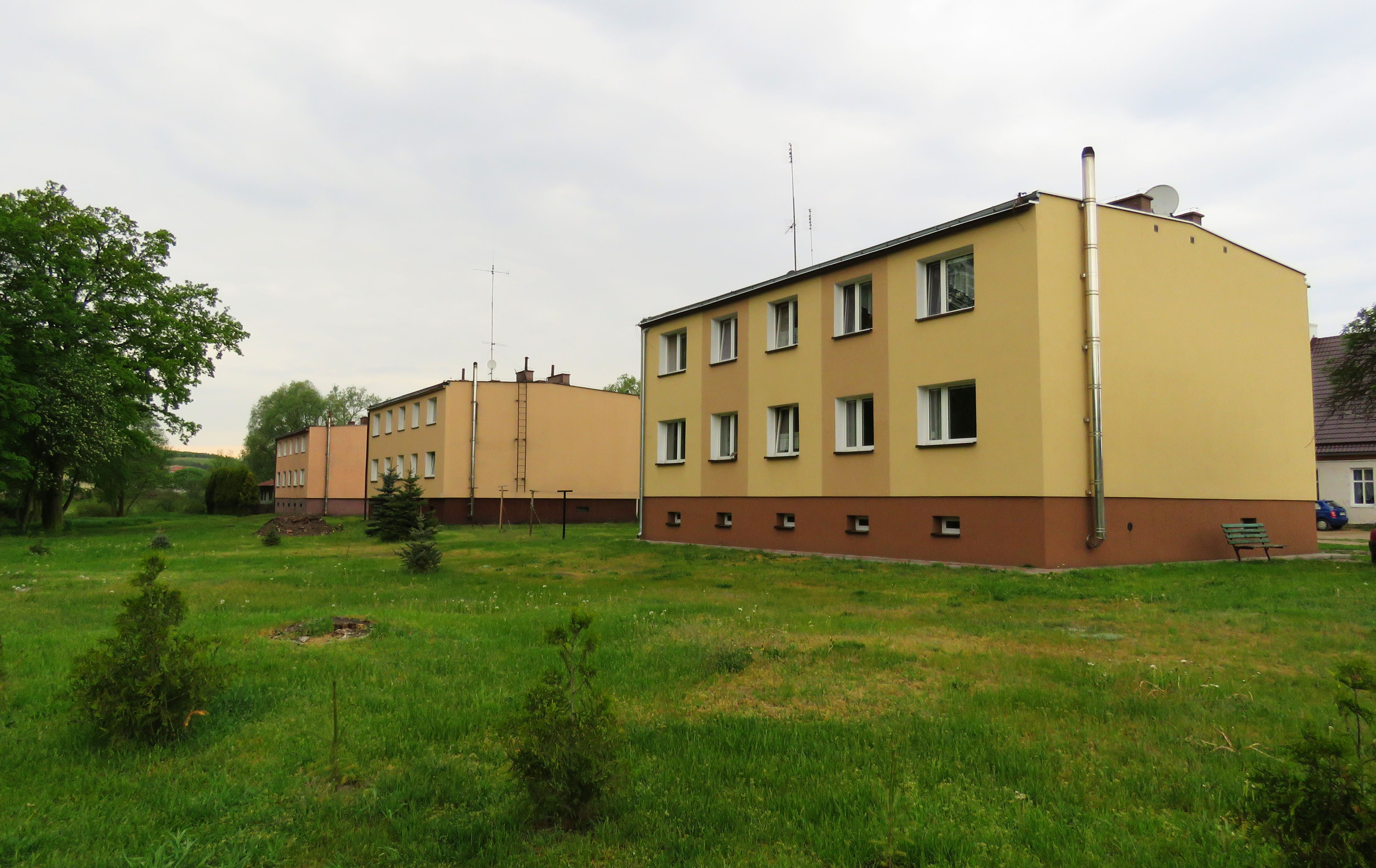 Centrum miejscowości